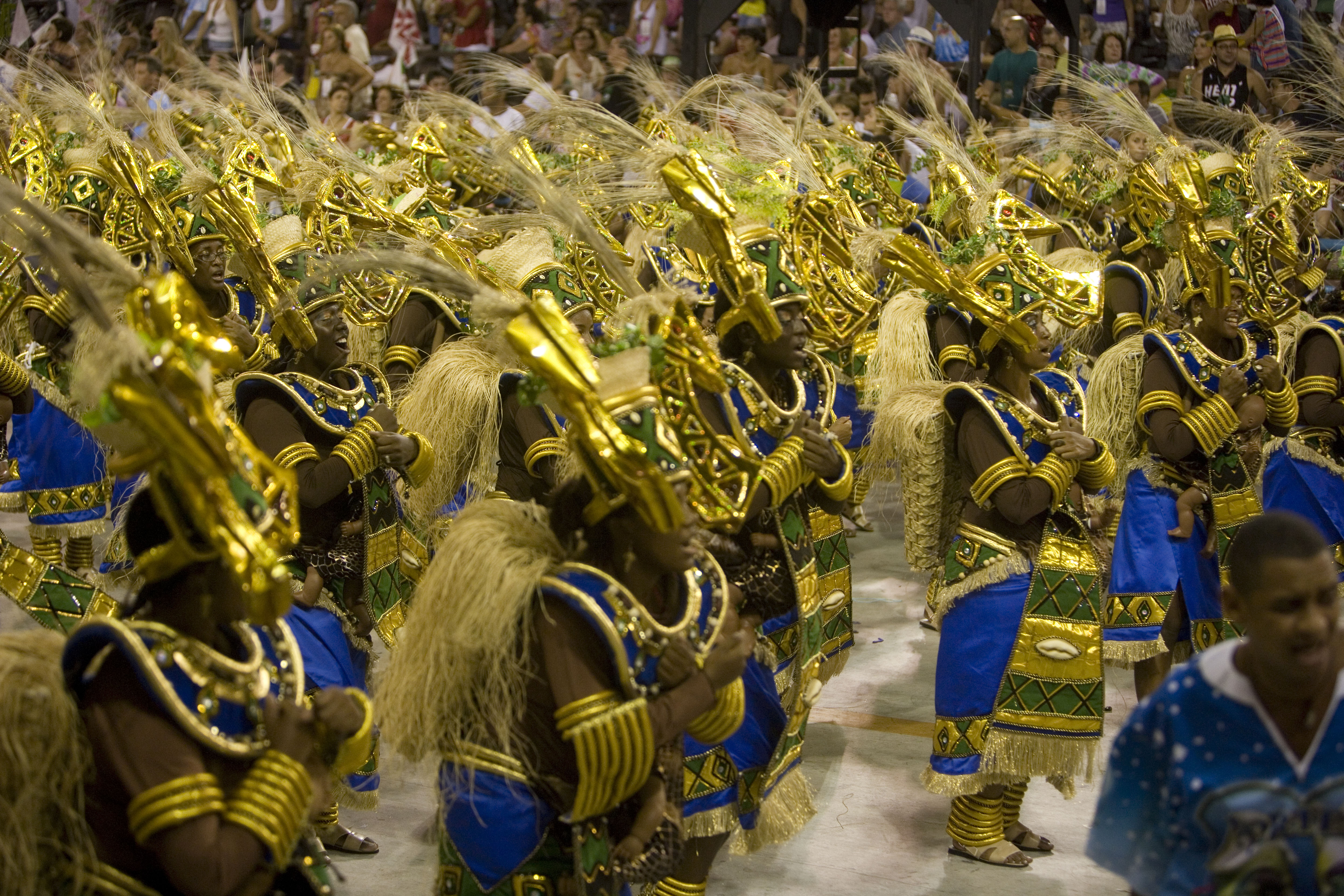 Portela Carnaval 2009 Segunda, 23 / 02 /2009 Camarote da Brahma